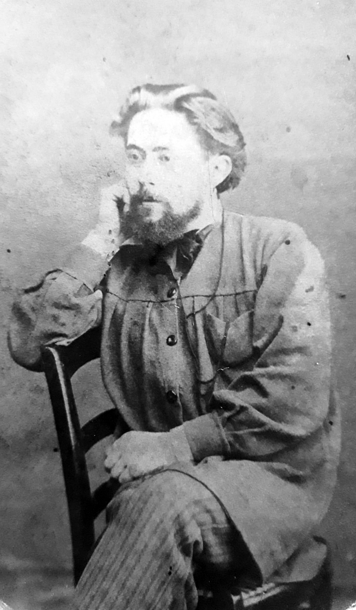 Тимофей Афанасьевич Франжоли, русский революционер-народник